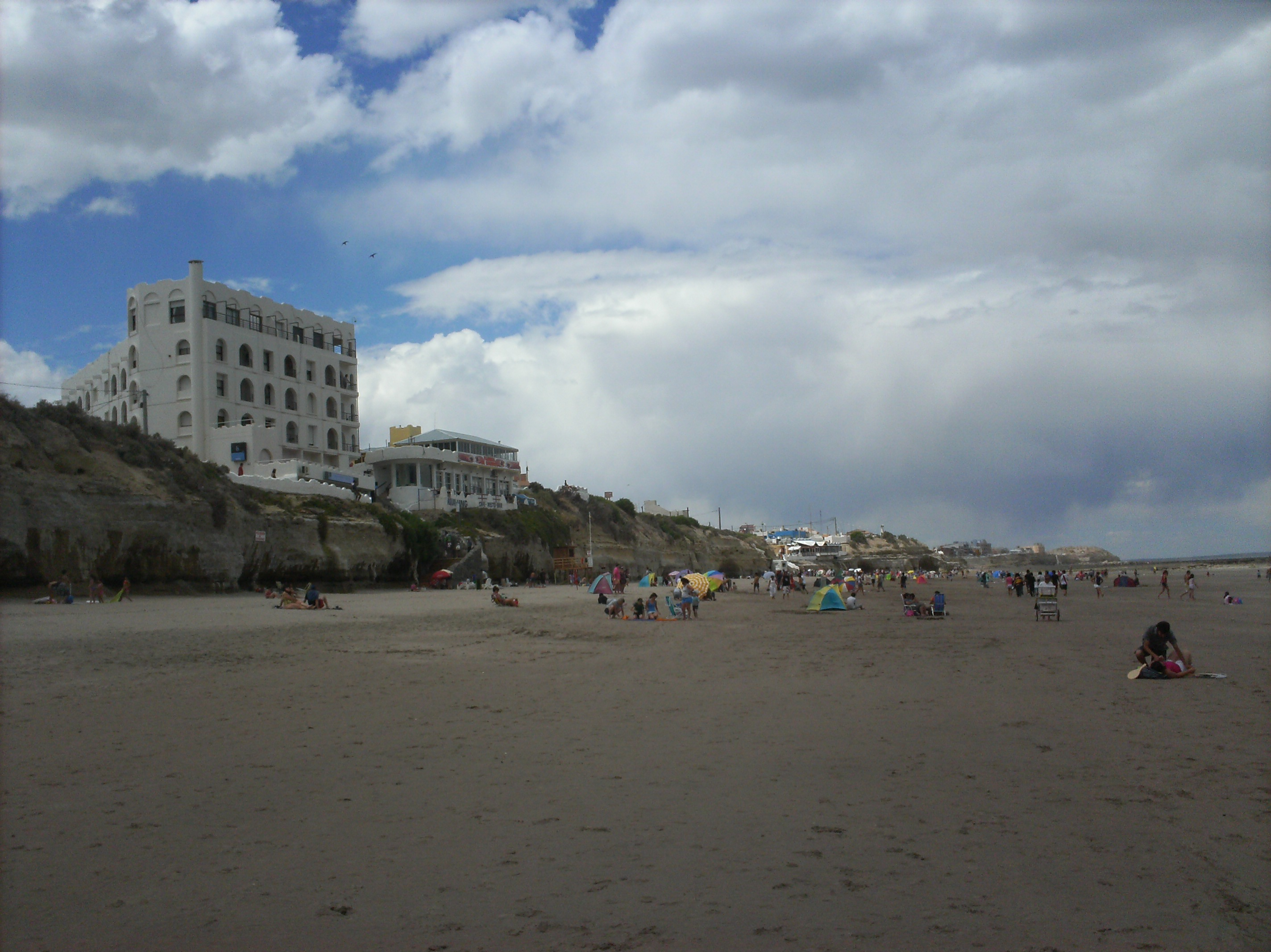 EL EDIFICIO MAS ALTO DE LAS GRUTAS